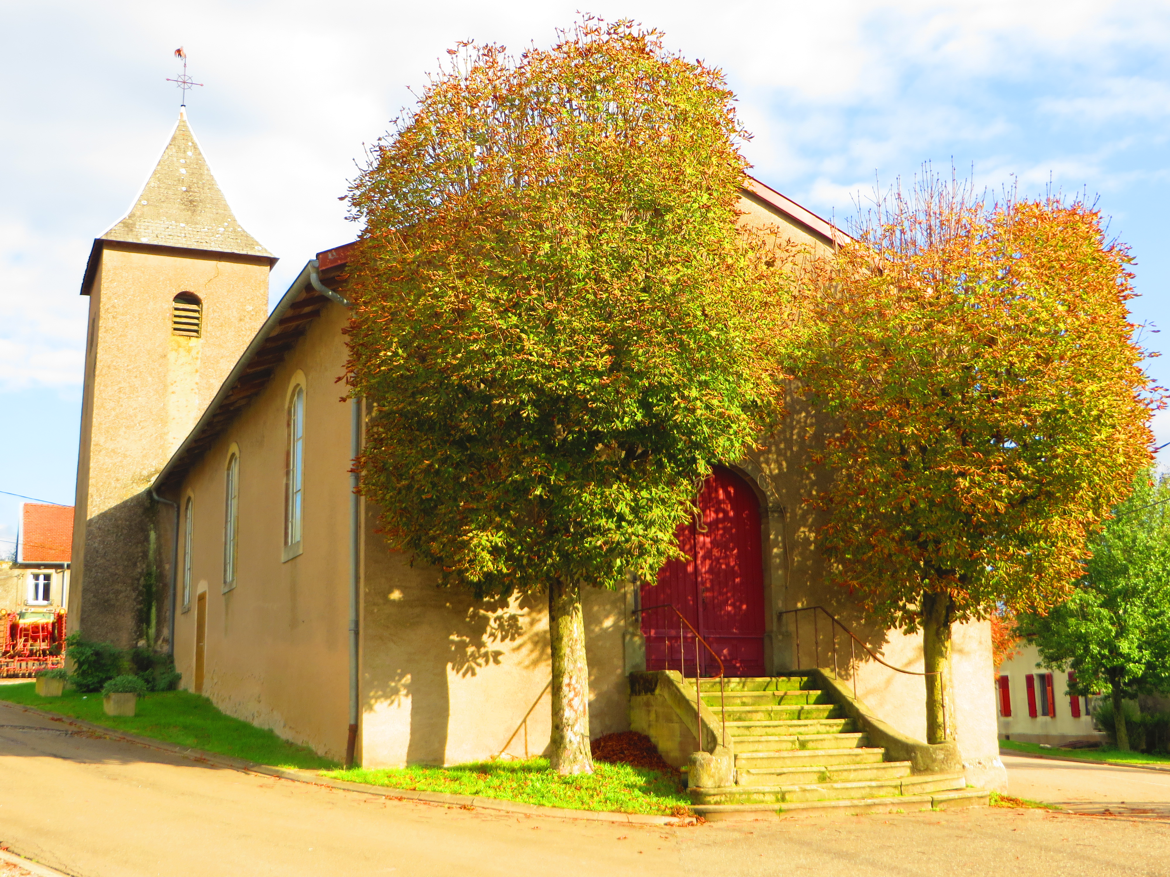 Haraucourt-sur-Seille Église Sainte-Croix